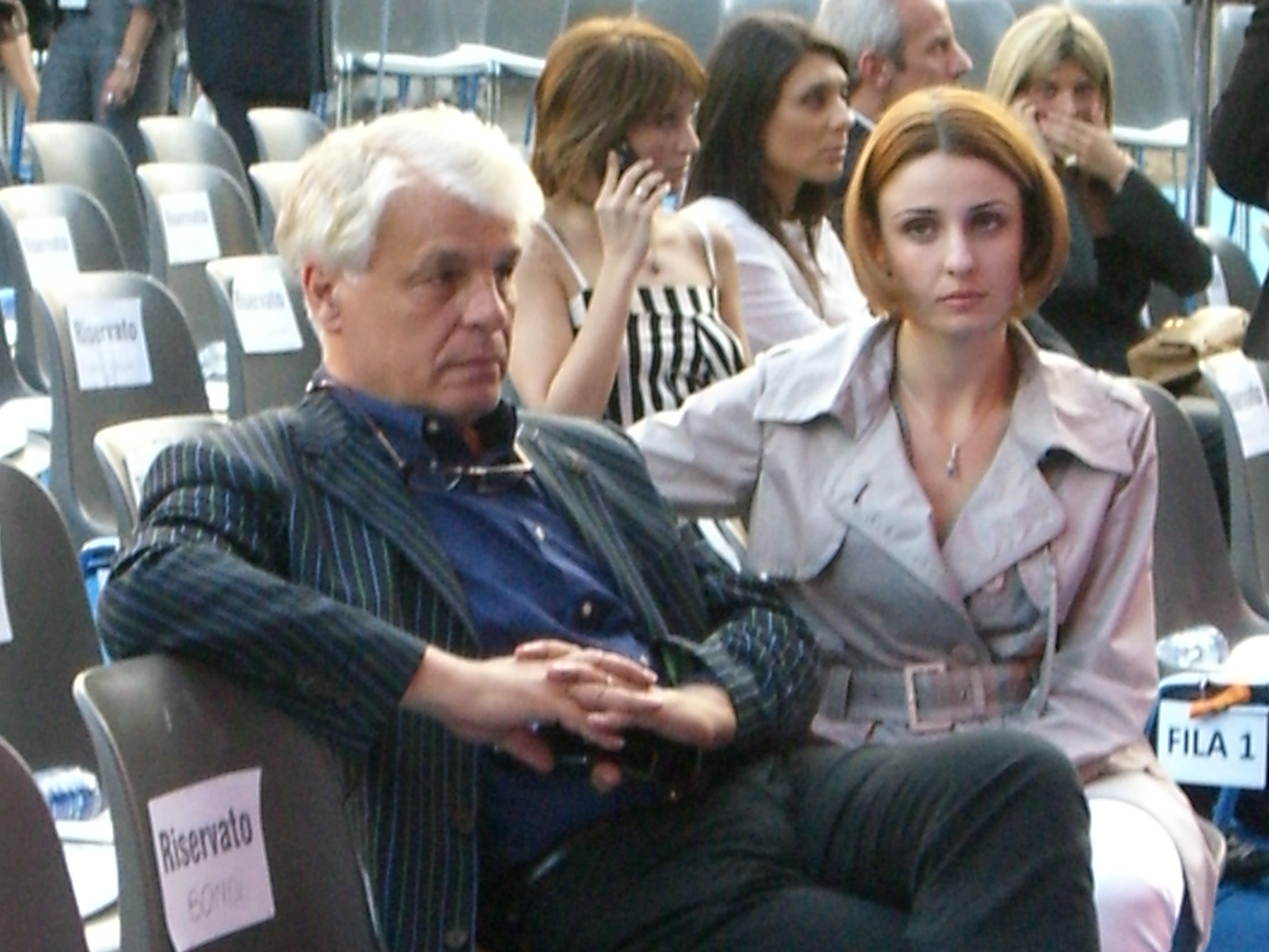 Michele Placido con la compagna Federica Vincenti